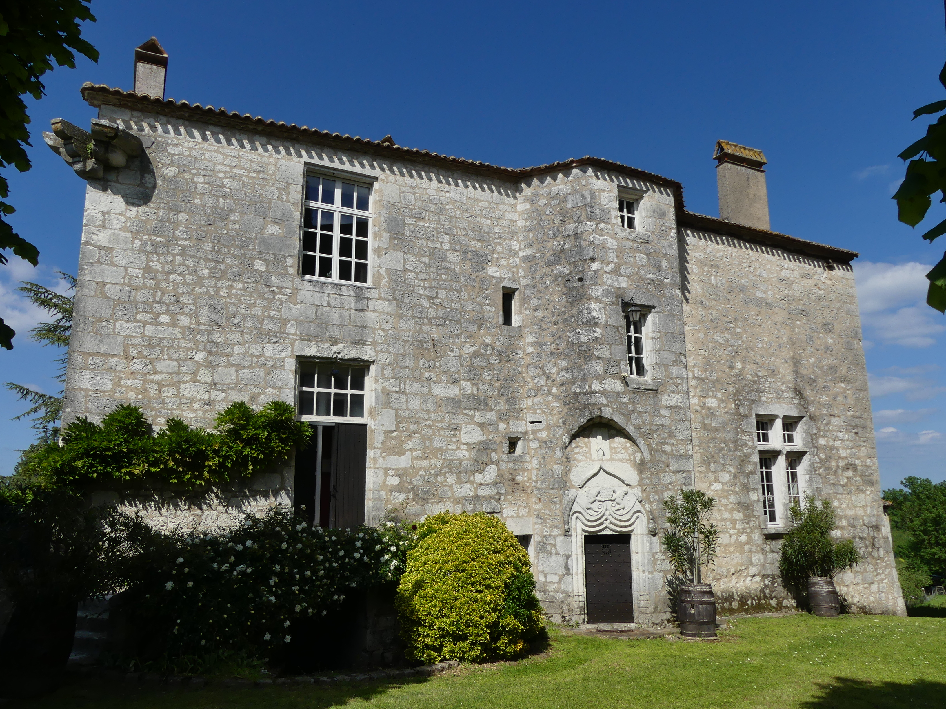 Le château (ancien presbytère) de Bouniagues, Dordogne, France.